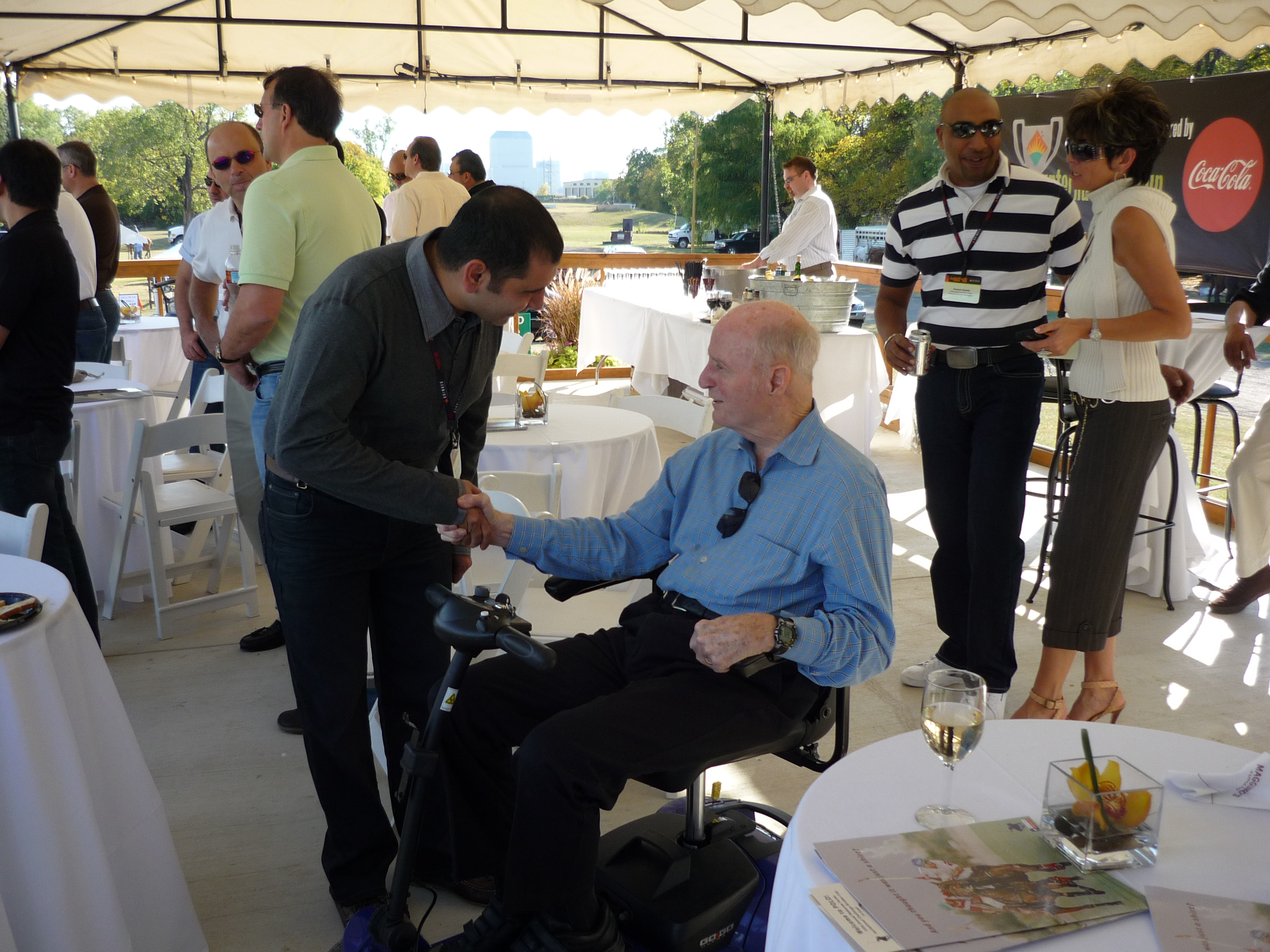 Norman Brinker